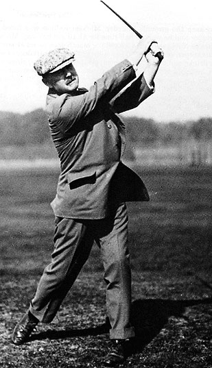 Donald Ross, Schots golfprofessional en golfbaanarchitect